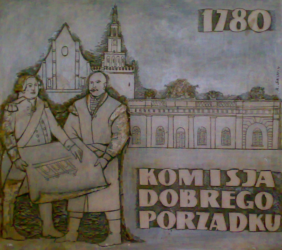 Komisja Dobrego Porządku - płaskorzeźba w Zamku Cesarskim w Poznaniu.